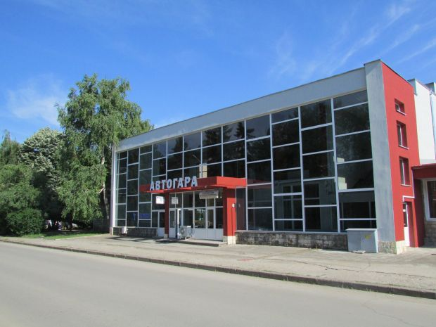 Автогарата на града